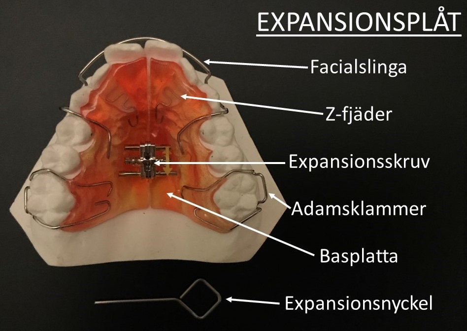 Expansionsplåt.